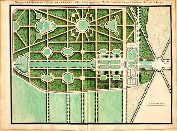 Plan général du château de Cherperine, jardins et parc, au pays du Maine, ayant appartenu au comte des Alleurs, ambassadeur du roi de France en Turquie. Plan extrait du recueil : œuvres d'architecture d'Alexis Delamair, envoyé à l'Electeur de Bavière en 1714.